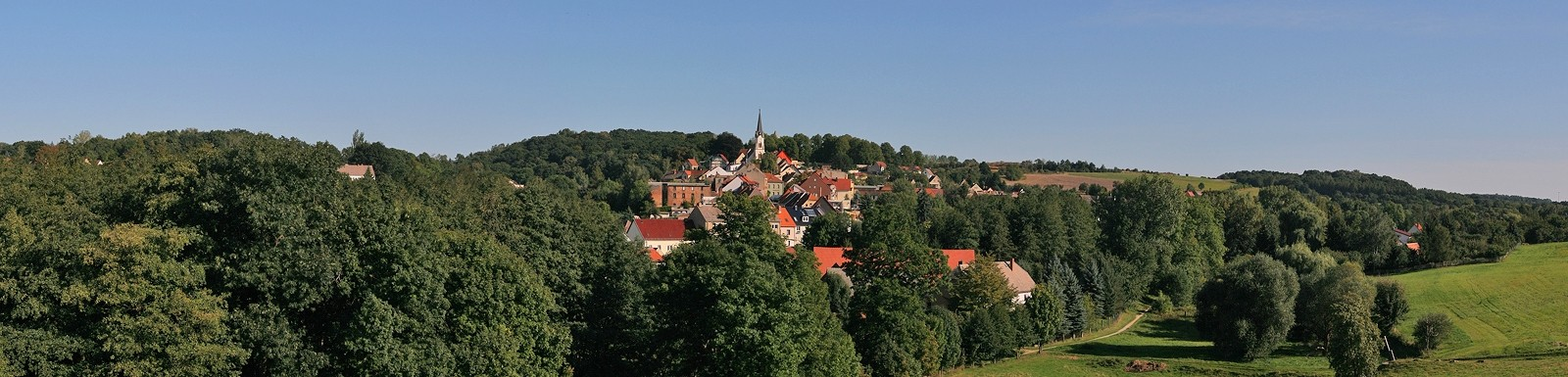 Panoramaansicht vom Stadtzentrum Osterfeld, Frank Ellmerich Osterfeld